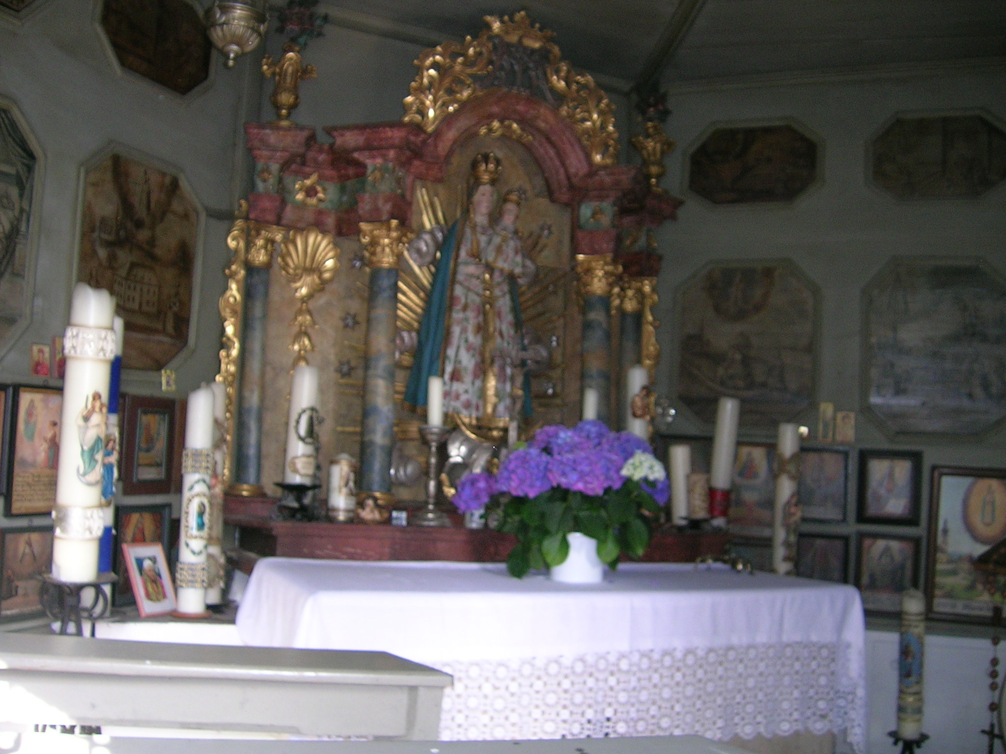 Frauenbrunnkapelle Traunwalchen - Altarraum This is a photograph of an architectural monument.